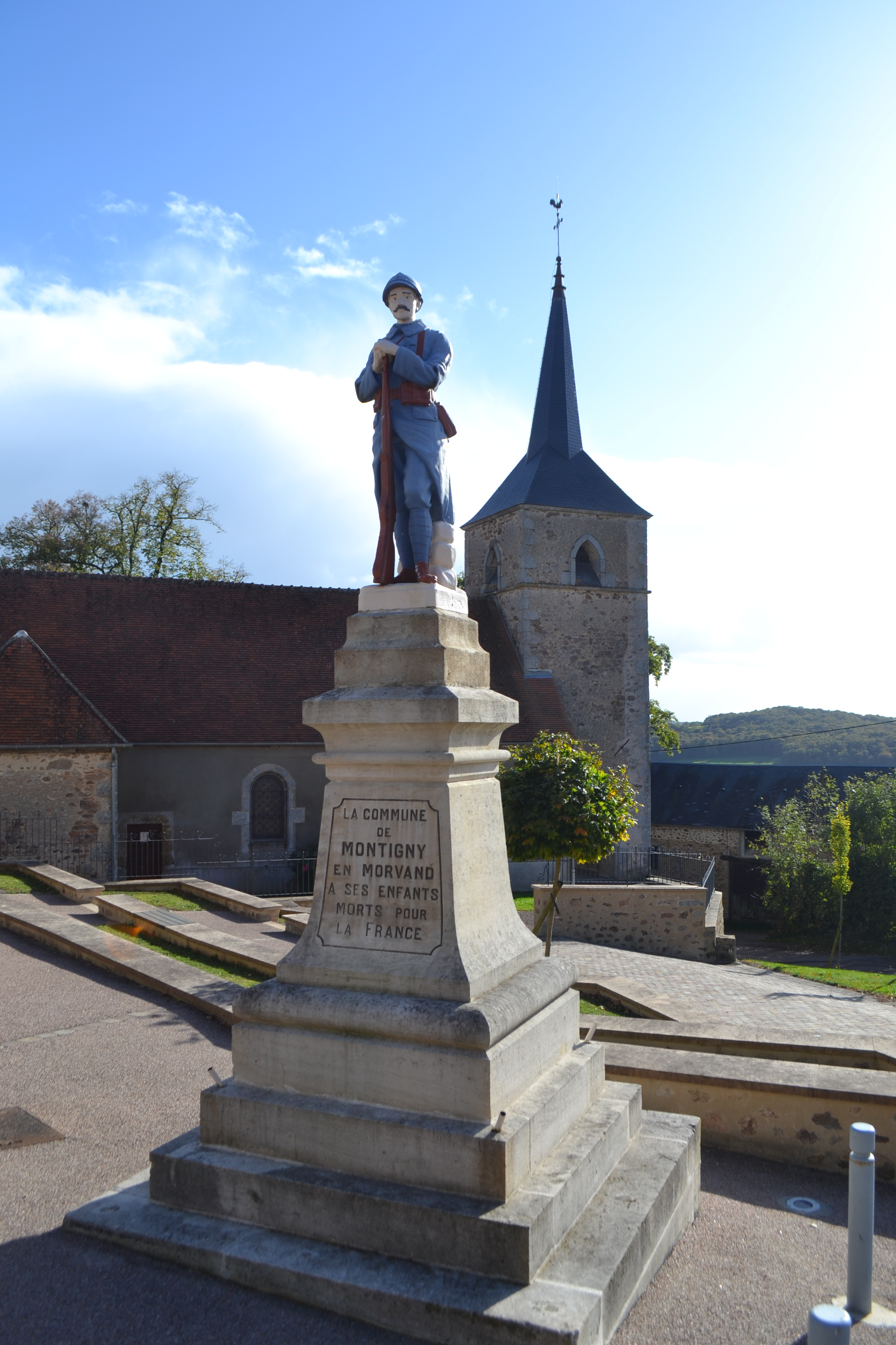 Monument aux morts et église de Montigny-en-Morvan, Nièvre.